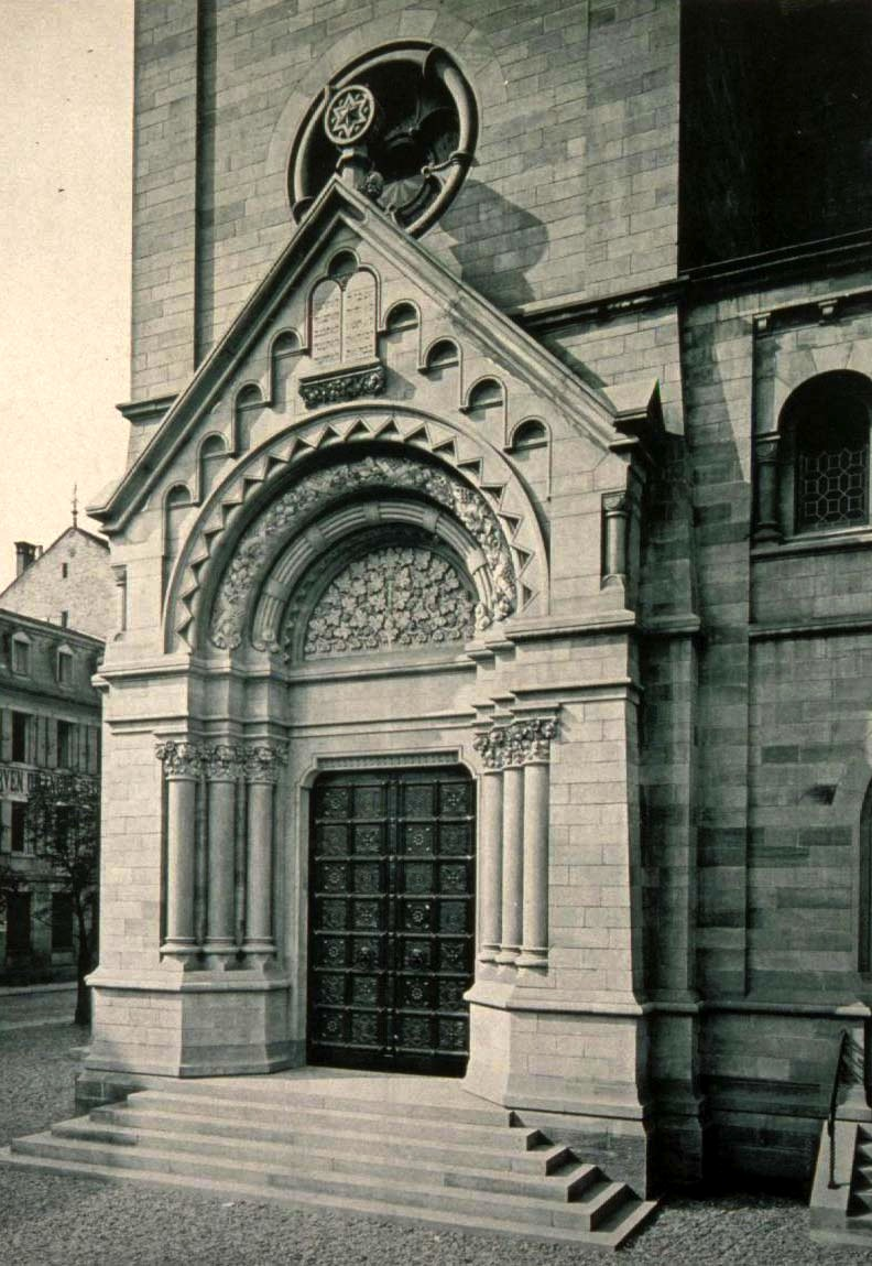 Strasbourg synagogue quai Kléber portail principal 1898-1940